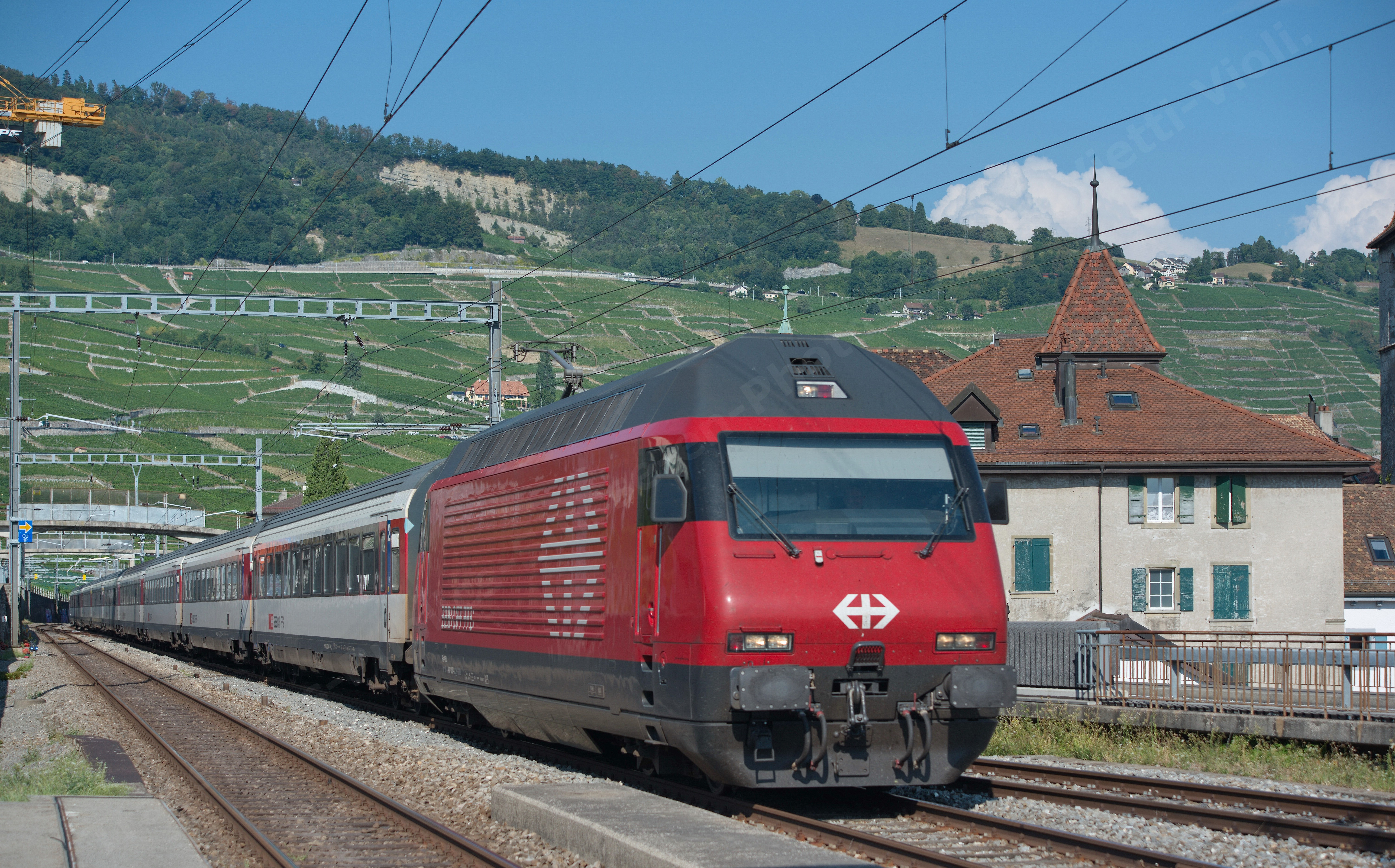 Re 460 026 °Fricktal°Ici à Cully